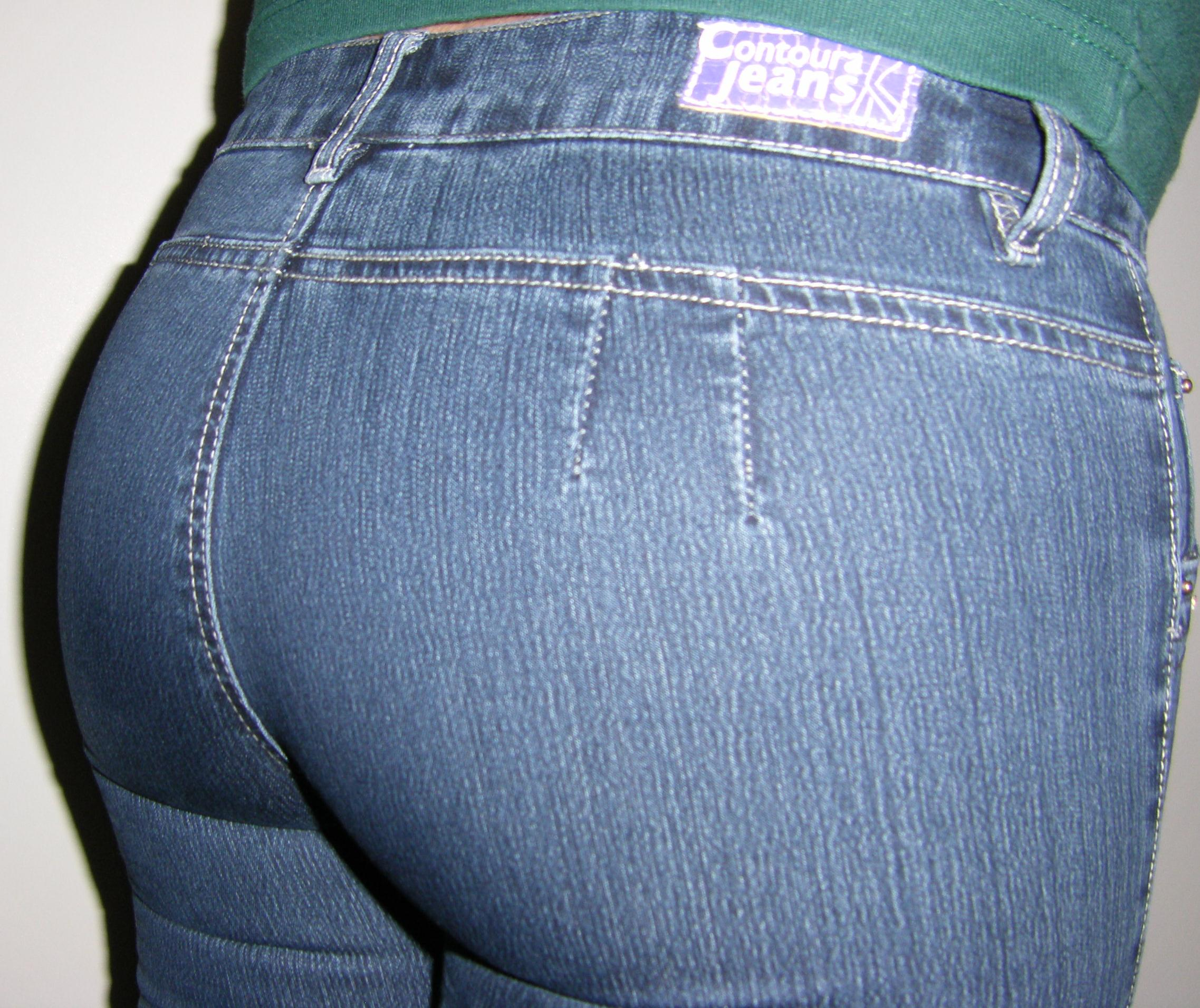 Contoura Jeans